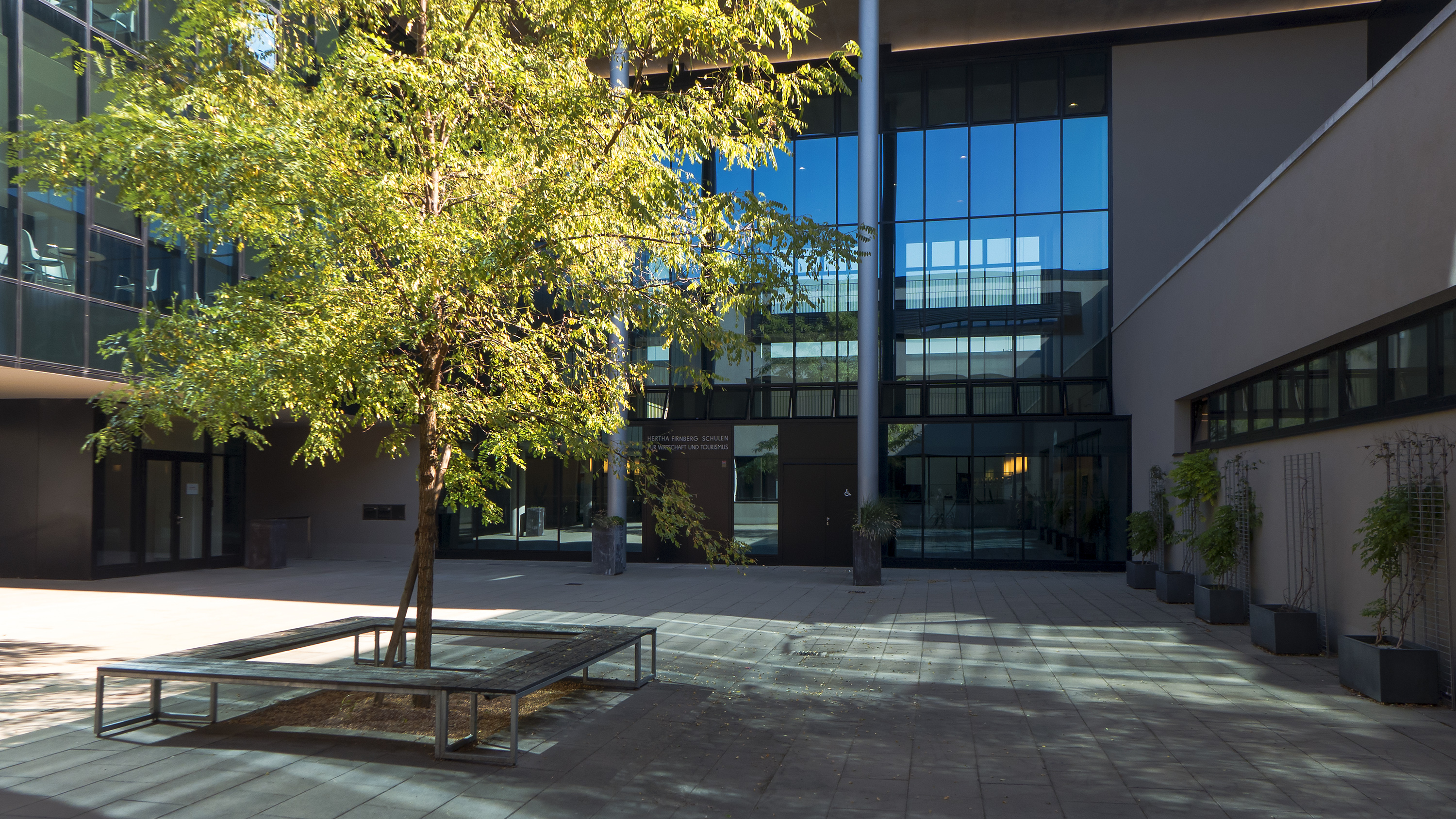 Hertha Firnberg Schulen für Wirtschaft und Tourismus in Wien 22